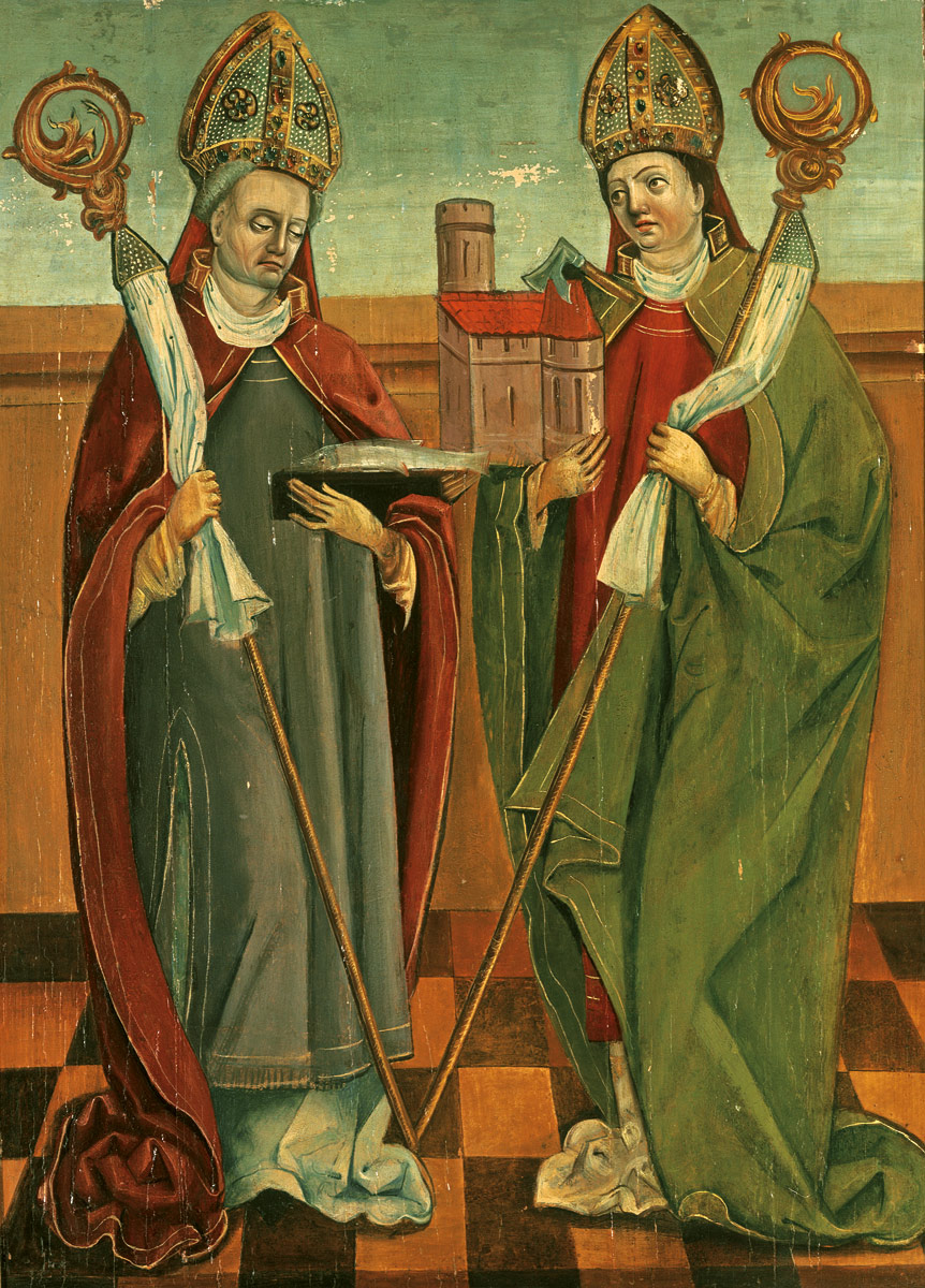 Die Heiligen Ulrich und Wolfgang